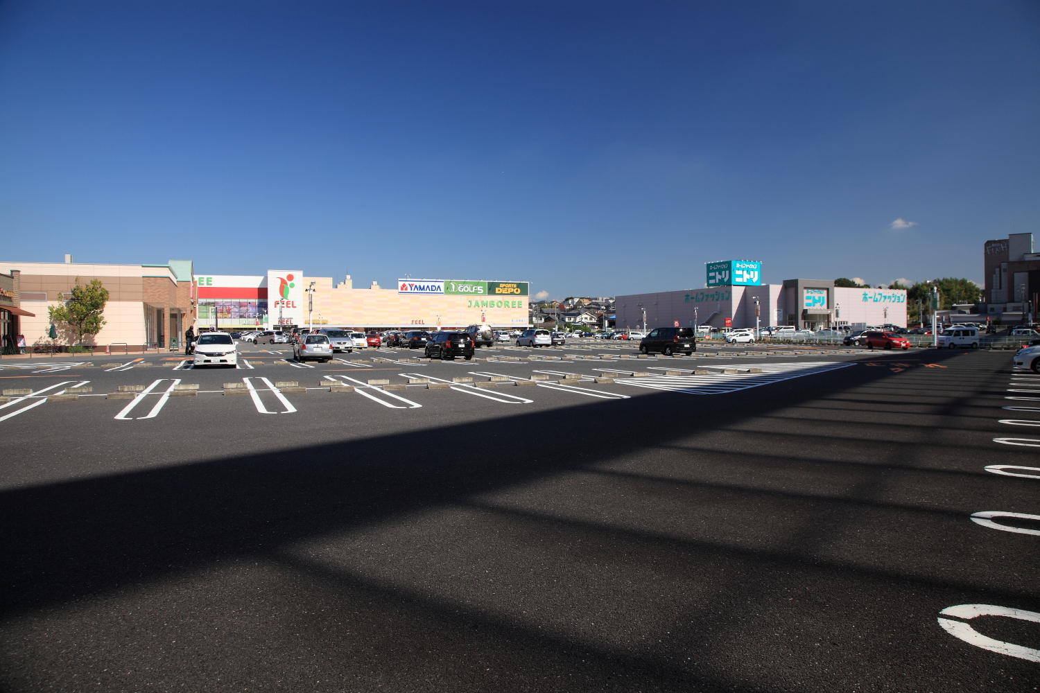 有松ジャンボリー（名古屋市緑区南陵、2012年）